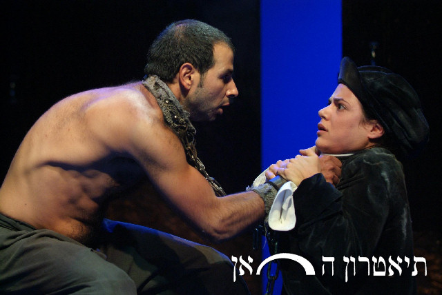 יוסי עיני בהצגה החיים הם חלום